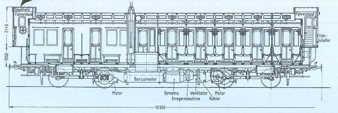 Maßskizze des KPEV VT1